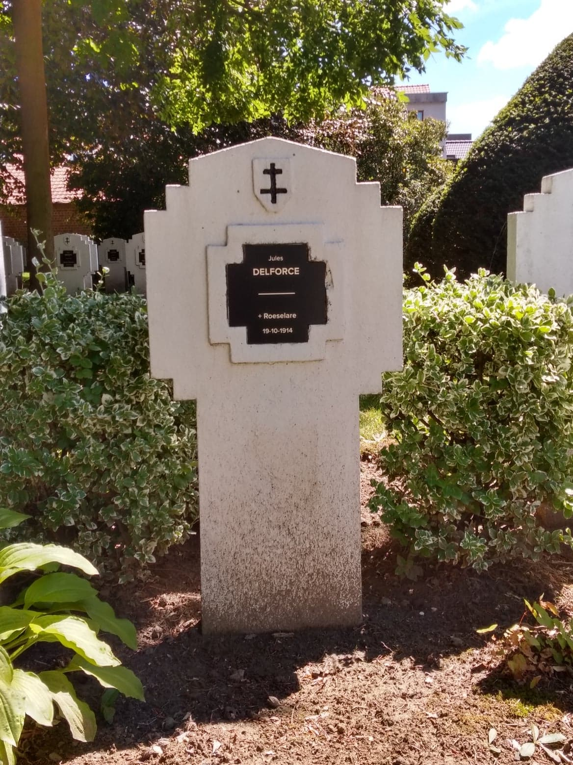 Grafzerk Schuwe Maandag slachtoffer Jules Delforce op de Oude Stedelijke begraafplaats in Roeselare